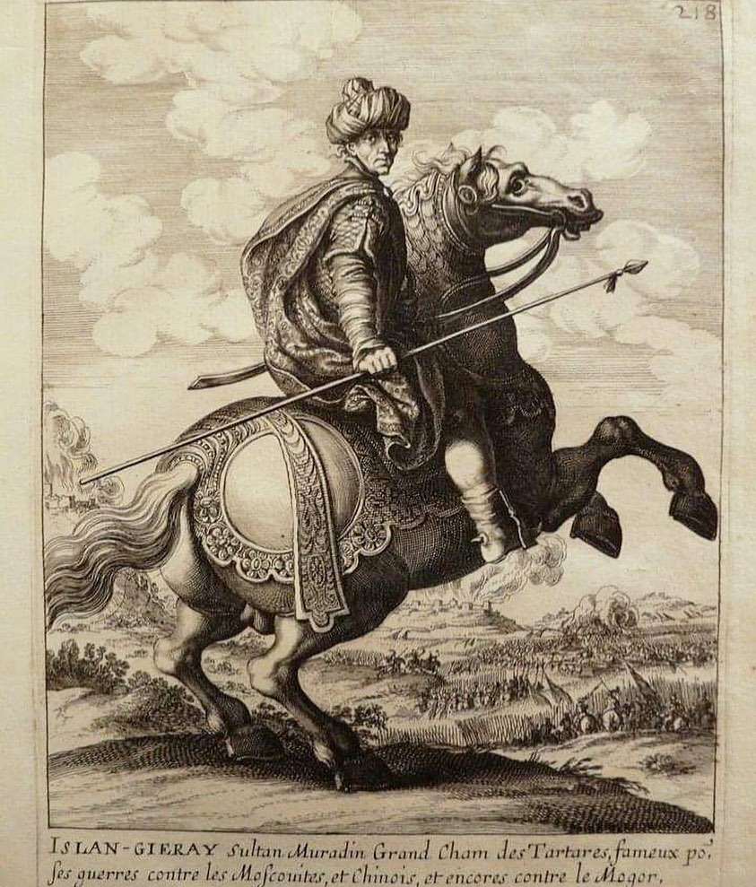 Гравюра 17 века, изображающая великого крымского хана Исляма III Герая.